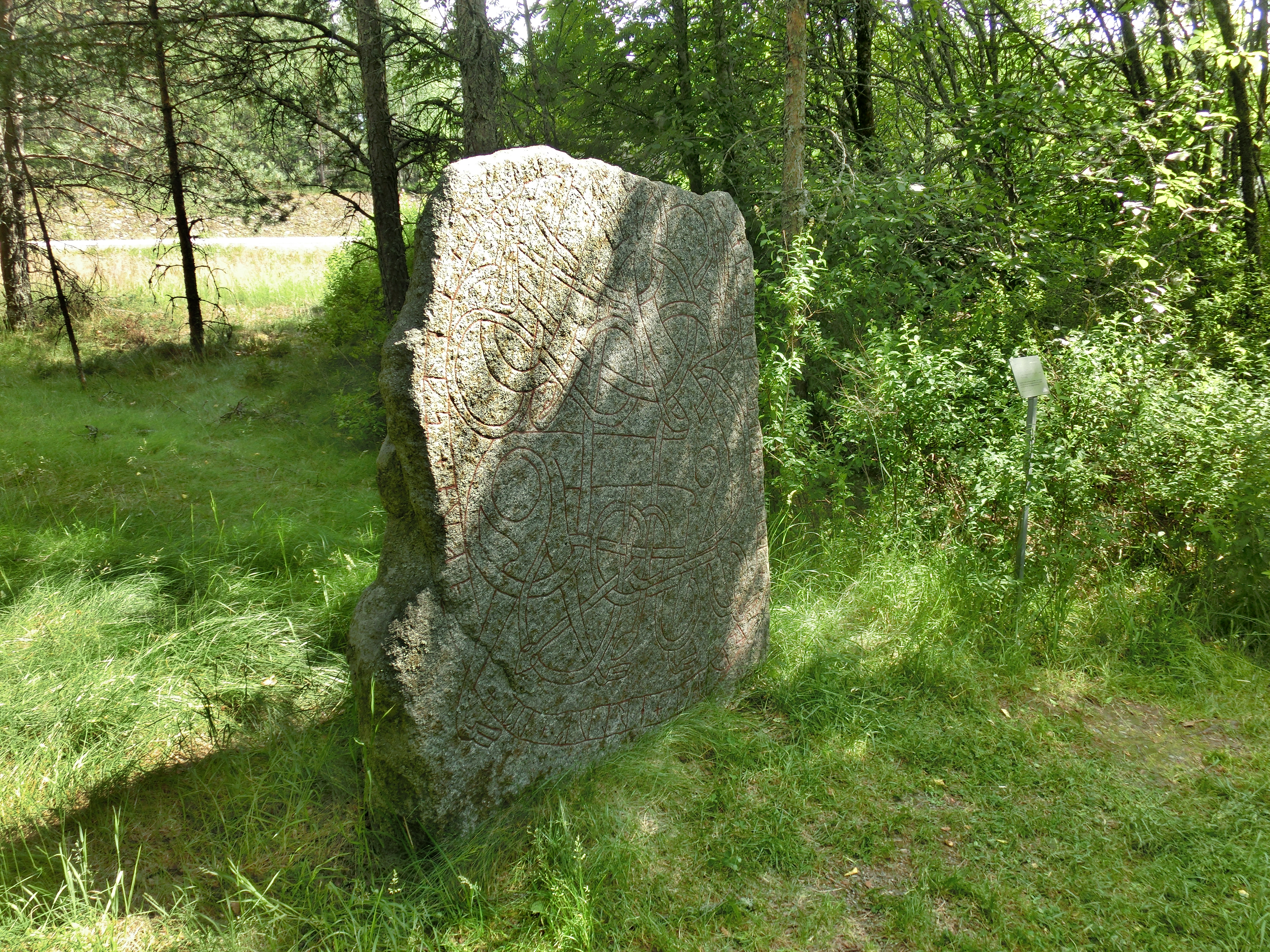 Runstenen U 1164 Stora Runhällen (RAÄ-nr Västerlövsta 54:1) i Västerlövsta socken, Heby kommun, Uppsala län, Uppland, Sverige. Runstenen Stora Runhällen har gett namn åt ett intilliggande torp, som i sin tur gett namn till samhället Runhällen i Enåkers socken.